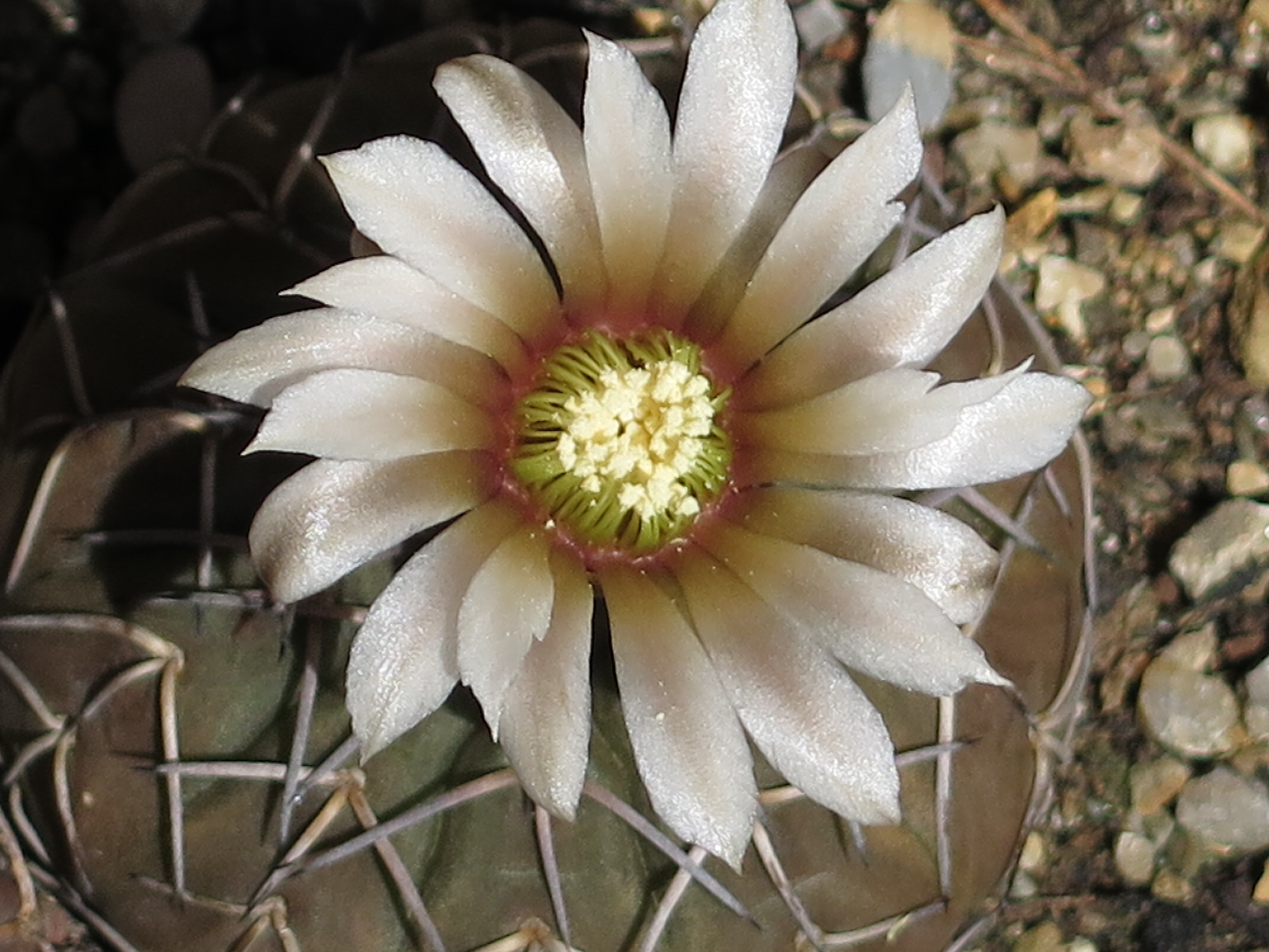 Il fiore del gymnocalycium stellatum